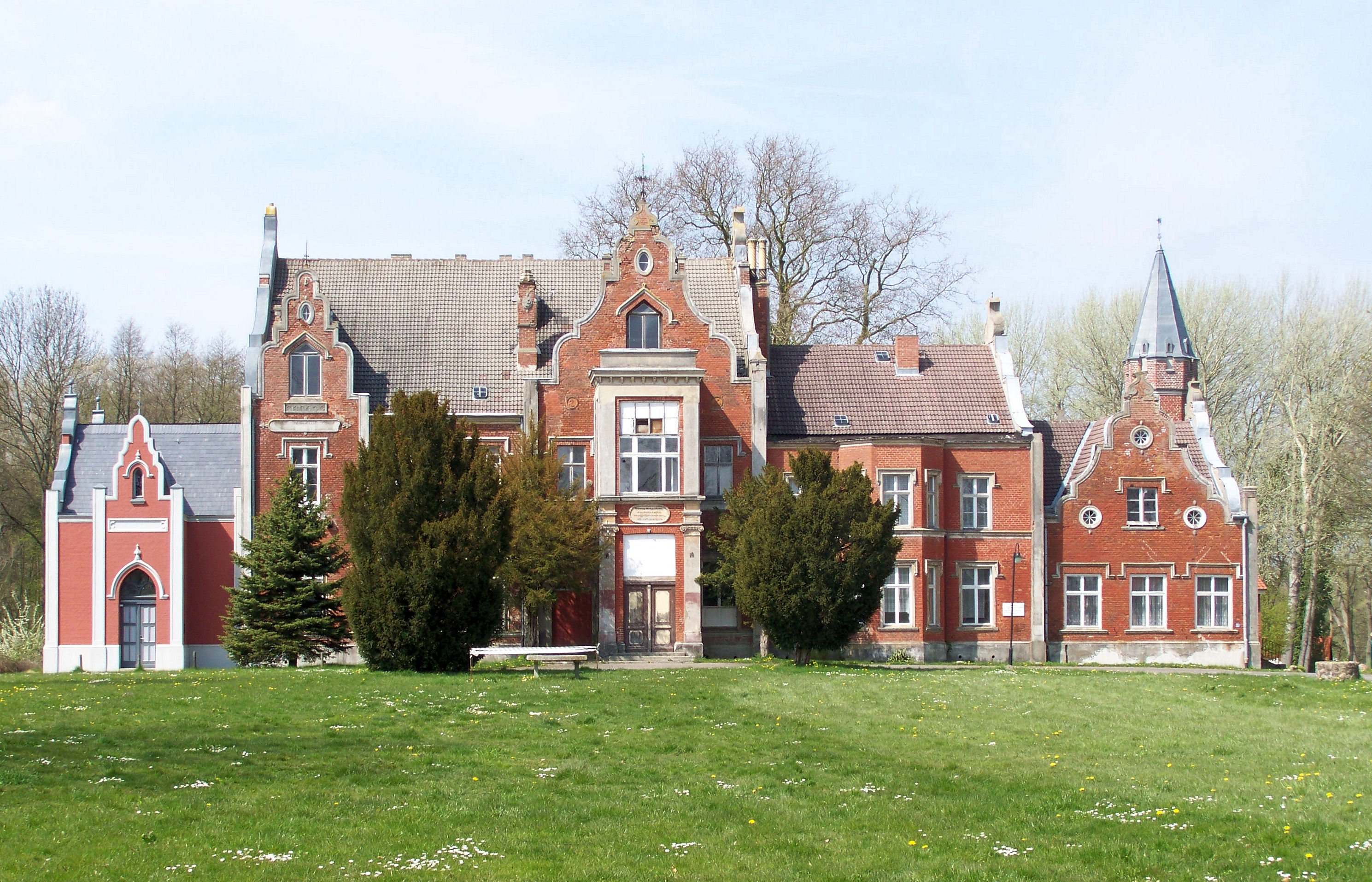 Parow, Gutshaus (2008-04-27)